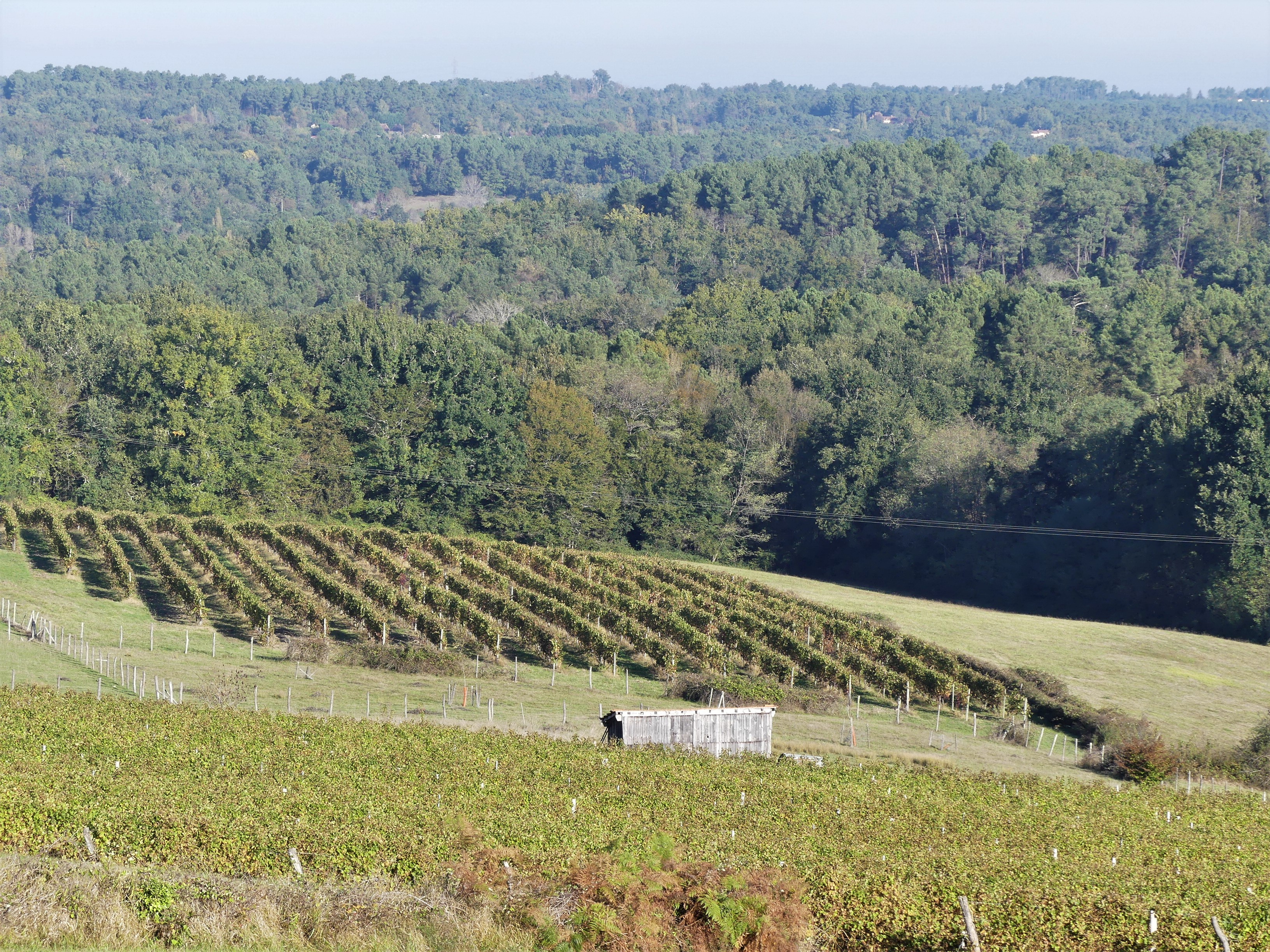 Paysage de vignes et de forêt du Landais au nord-ouest de Sainte-Foy-des-Vignes, Ginestet, Dordogne, France.